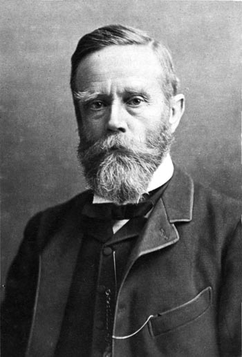 Sir John Gordon Sprigg (1830-1913)